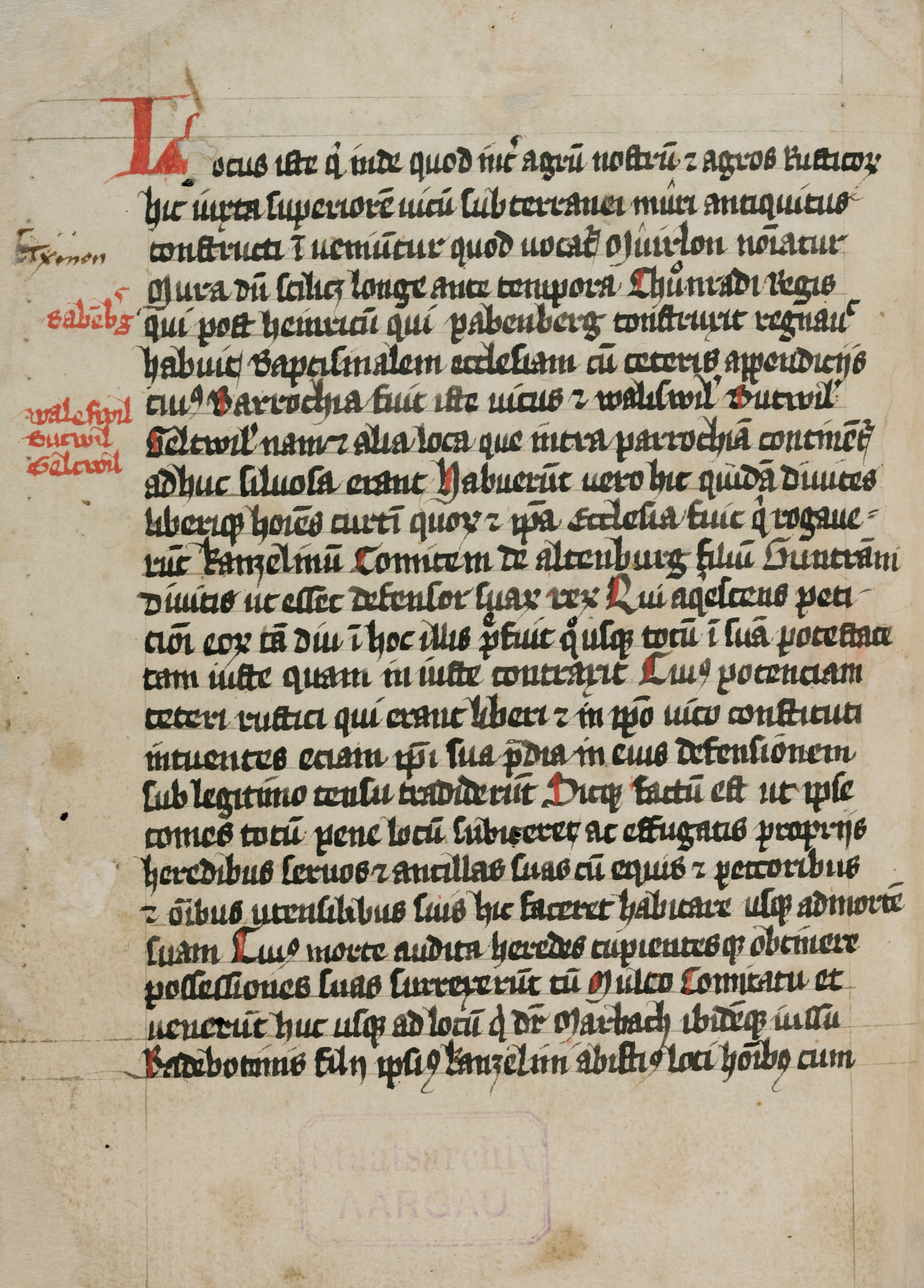 Primera página del Acta Murensia, un manuscrito del siglo XII de la Abadía de Muri en Suiza.